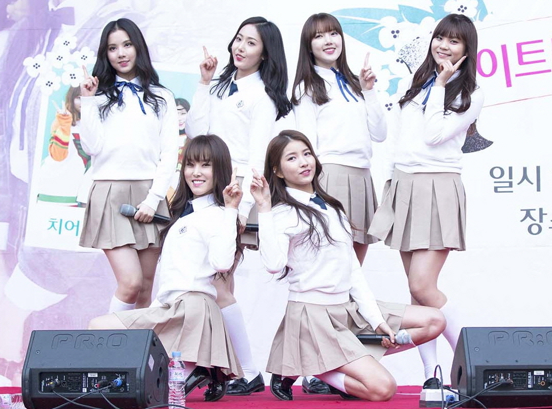 16.03.13 롯데몰 김포공항 여자친구